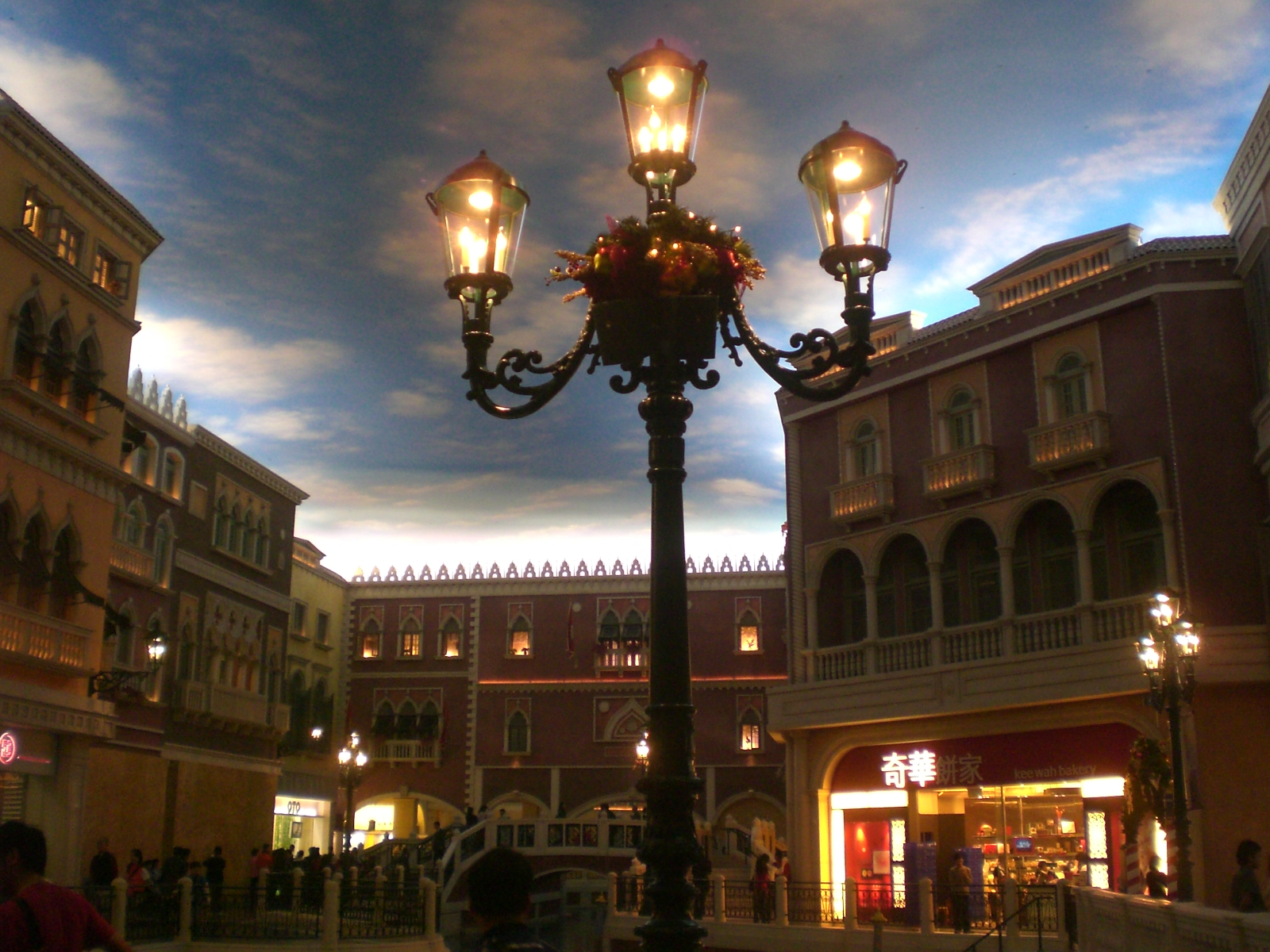 澳門威尼斯人渡假村酒店 奇華餅家